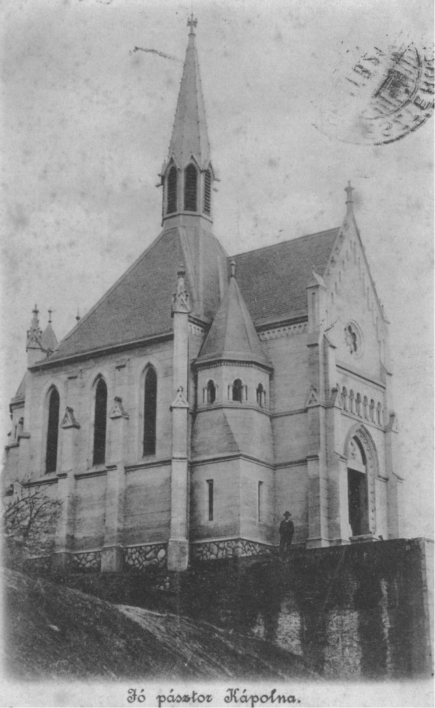 Jó pásztor chapel, Esztergom